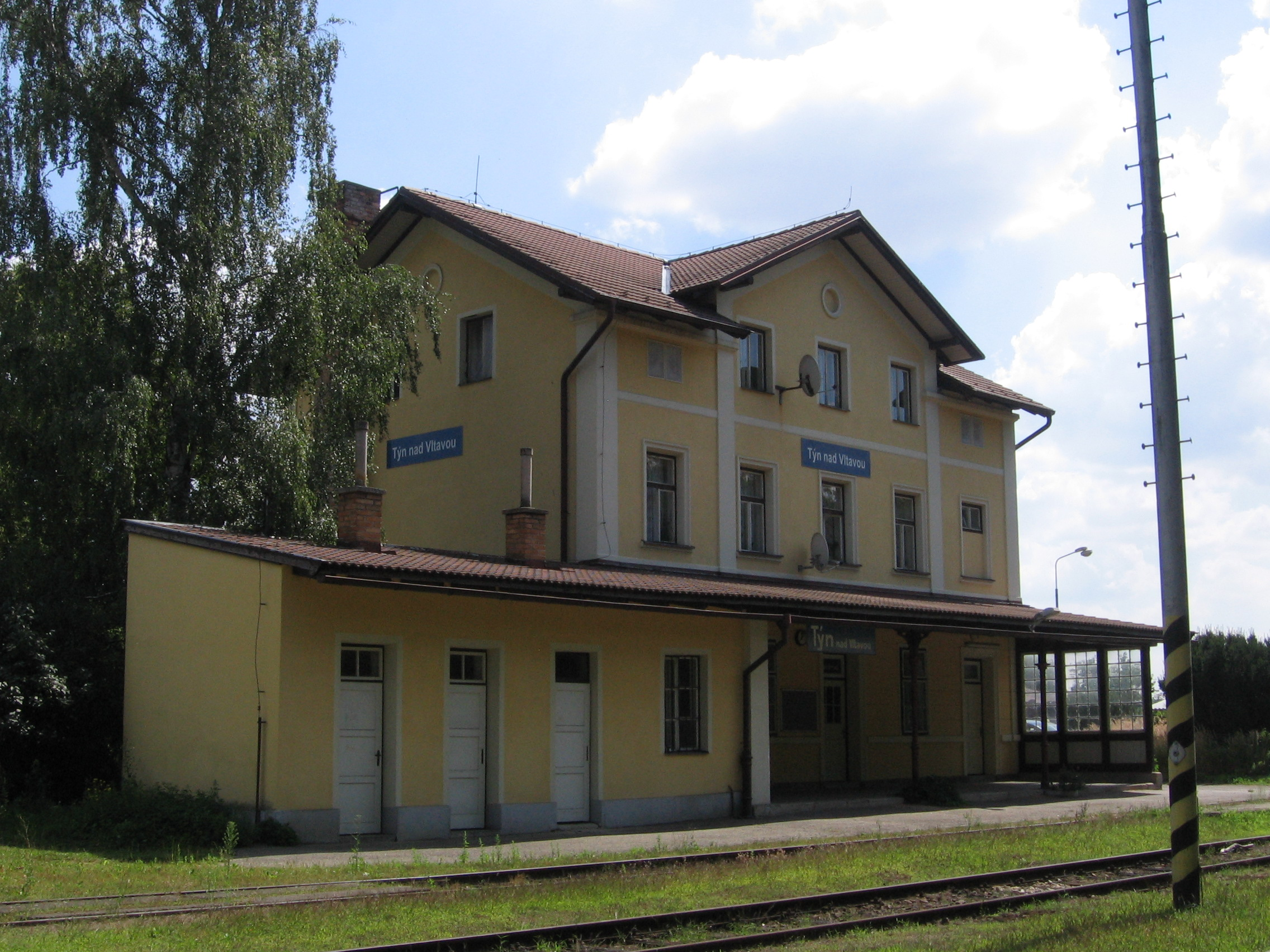 Nádraží v Týně nad Vltavou